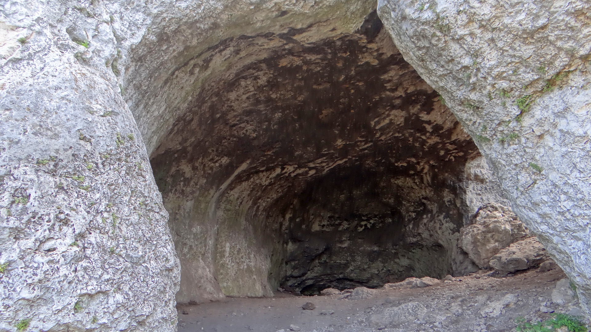 Schronisko Kazamar w Cyrku na Górze Zborów w Podlesicach